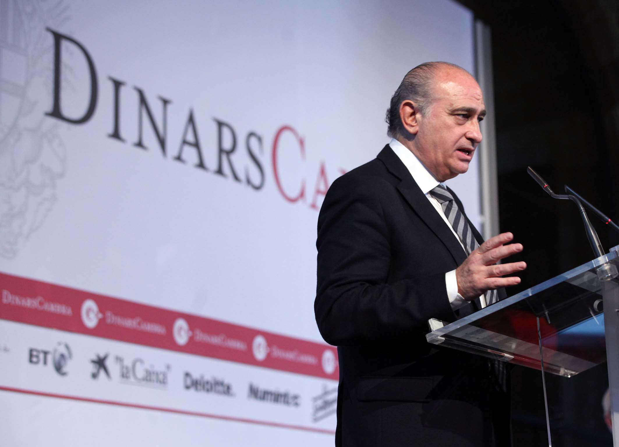 Participació de Jorge Fernández Díaz, candidat del Partit Popular a Barcelona a les Eleccions Generals al Congrés dels Diputats en els Dinars Cambra. El títol de la seva ponència: "Catalunya i altres claus del canvi a Espanya".